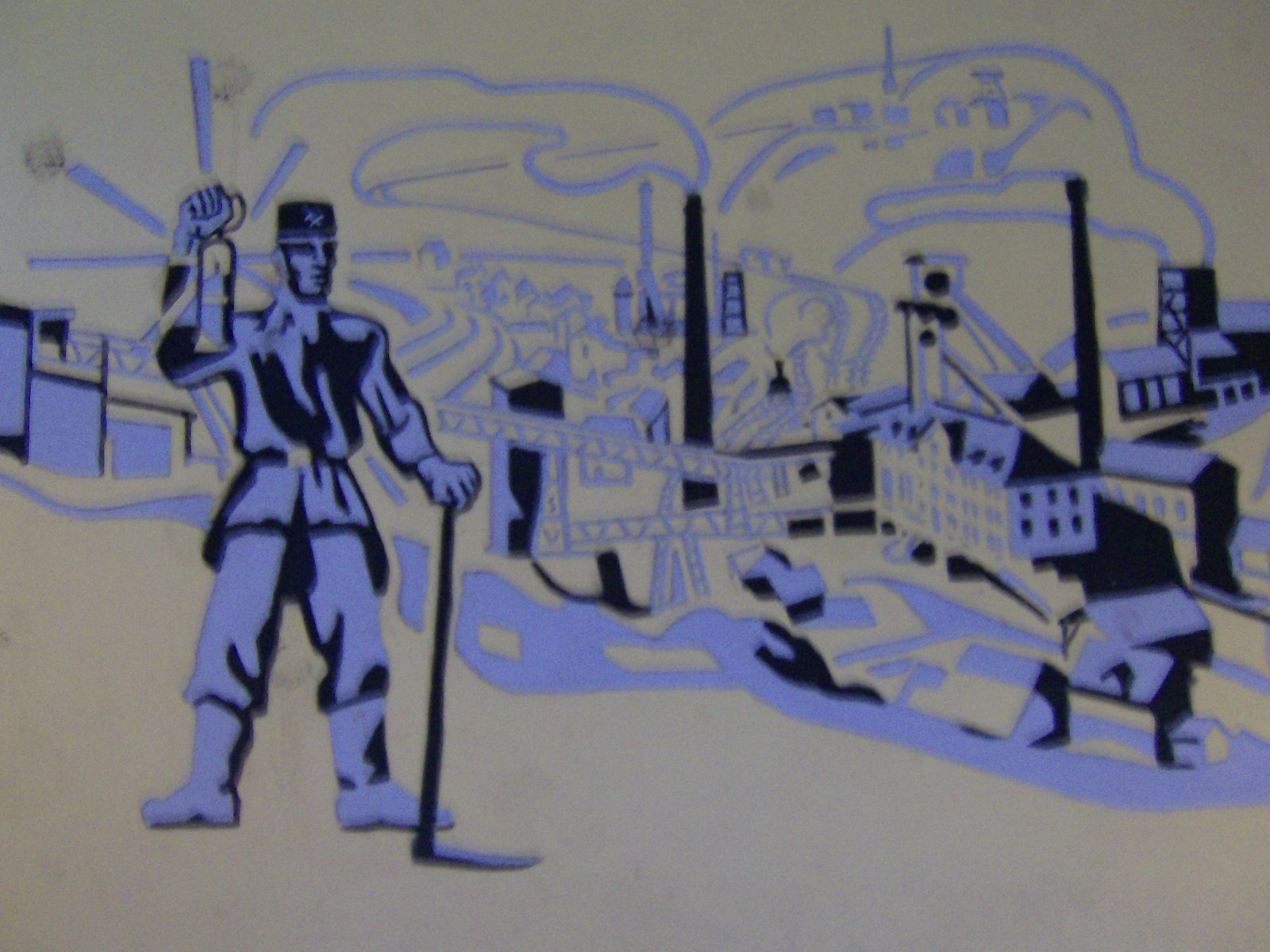 Ein Relief des alten Gosenbachs an der Wand der Grundschule Gosenbach in Gosenbach